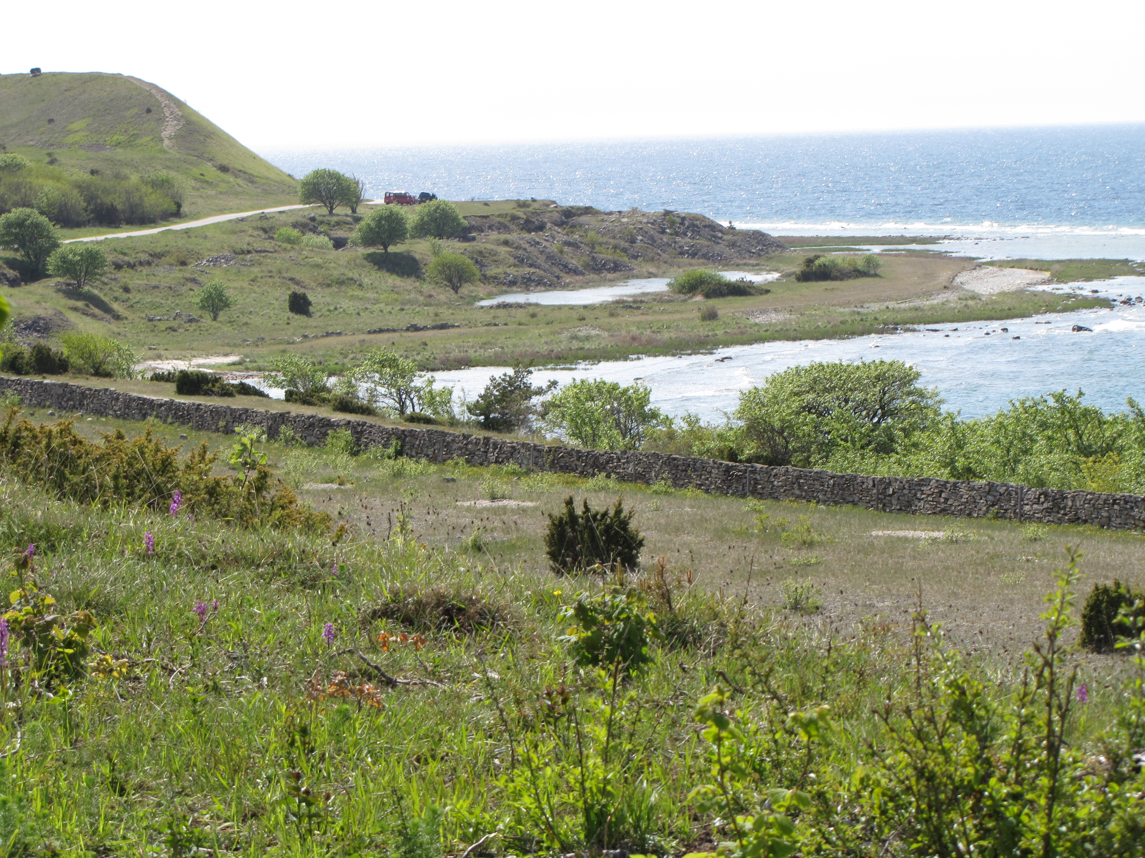 Husrygg är ett naturreservat på Storsudret på Gotland.